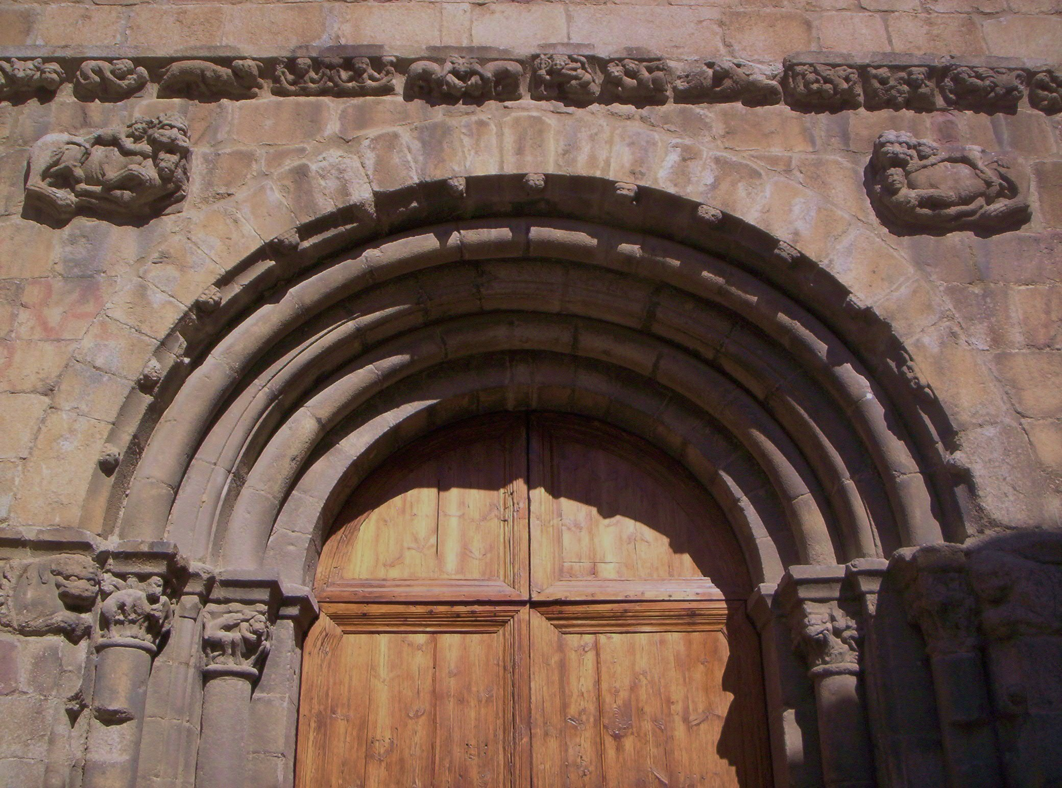 Portada de la catedral de la Seu d'Urgell.